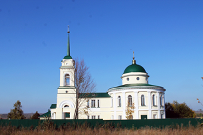 Одоевский район, д. Жемчужниково